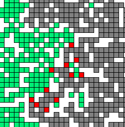 Modèle de propagation de feux de forêts